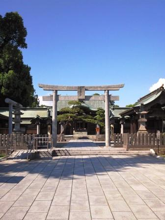 熊本県八代市にある八代宮